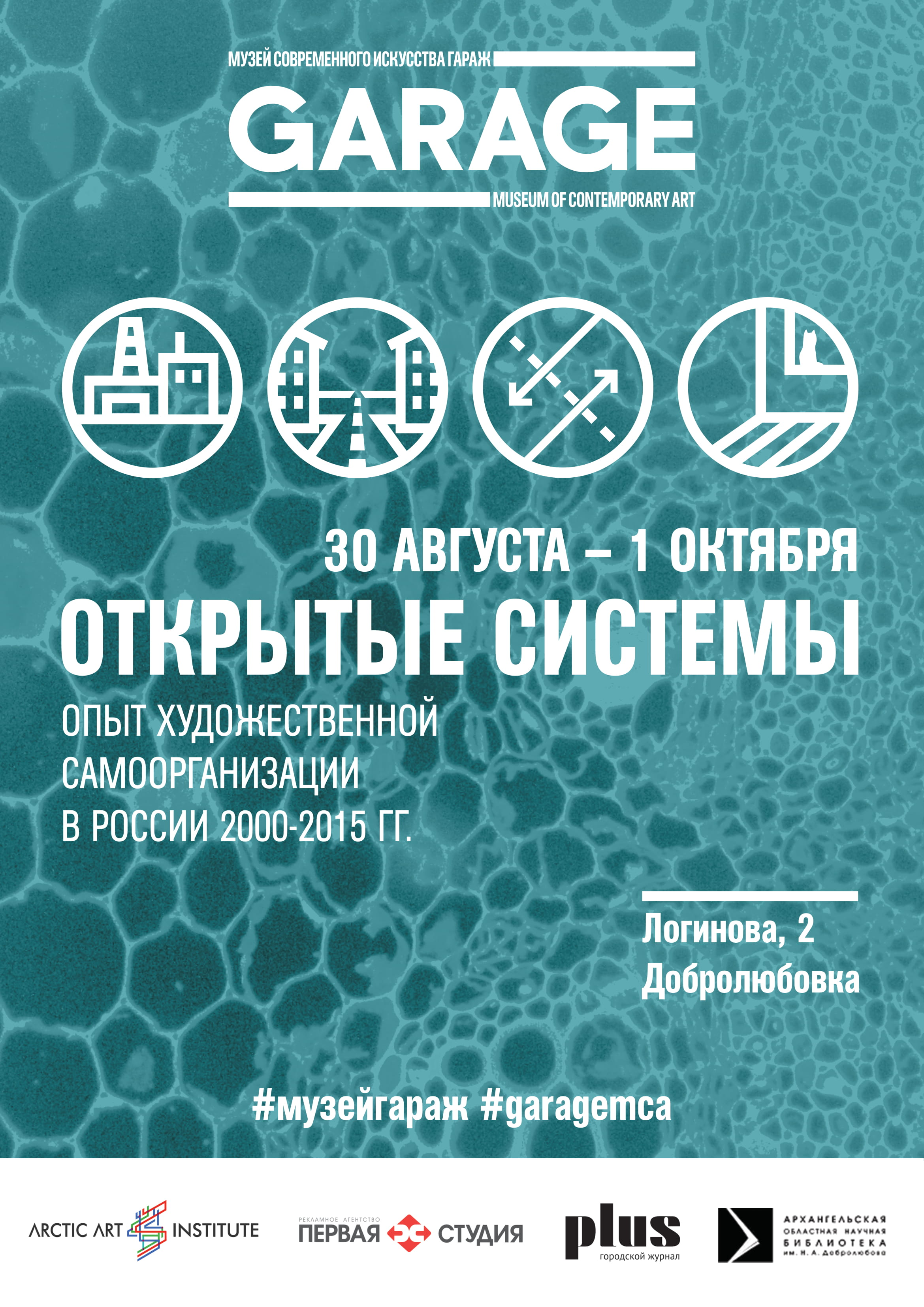 Афиша выставки "Открытые системы" в АОНБ им. Н. А. Добролюбова (Архангельск)